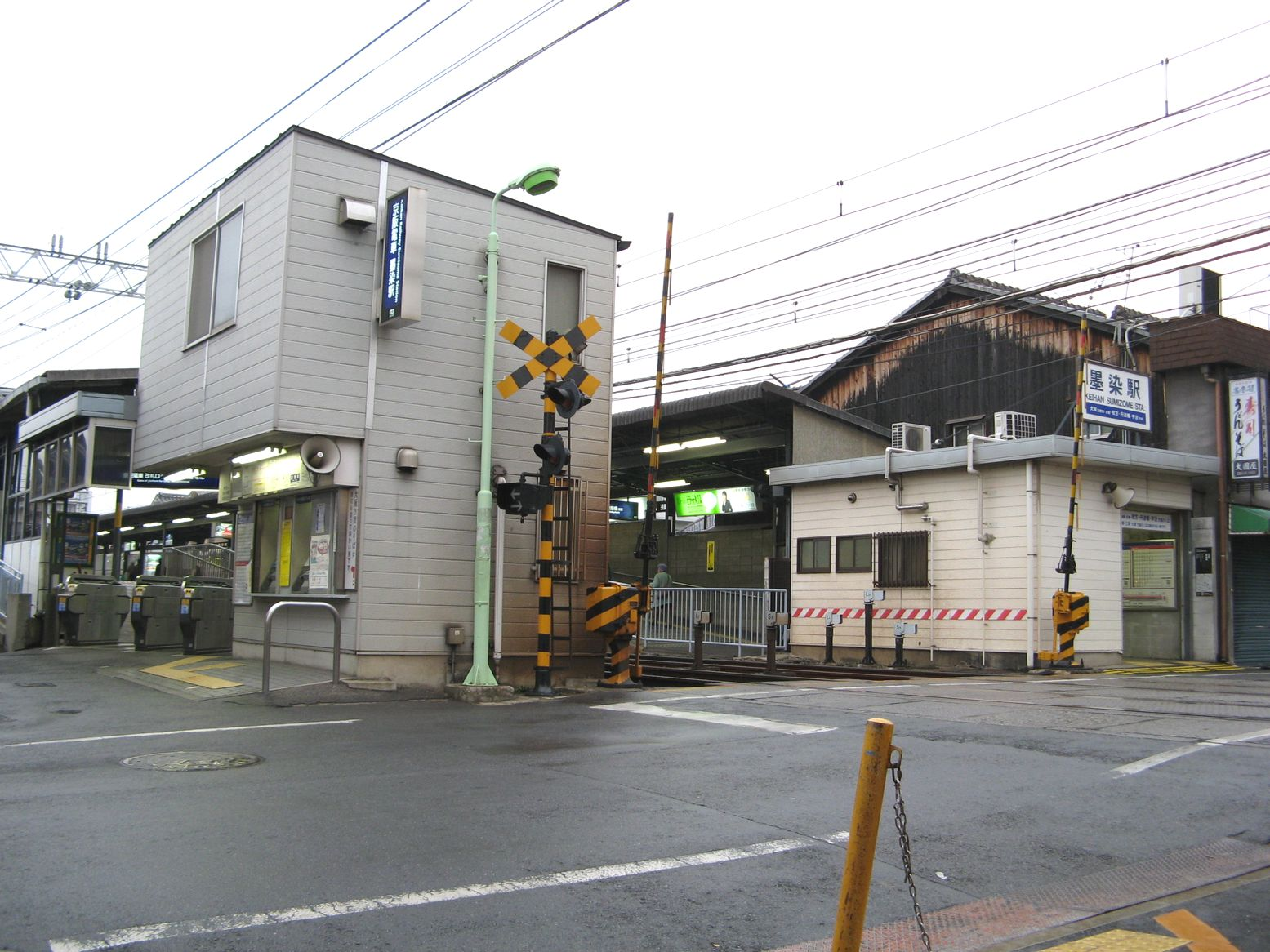 京阪本線墨染駅 2007年12月 Bakkai撮影